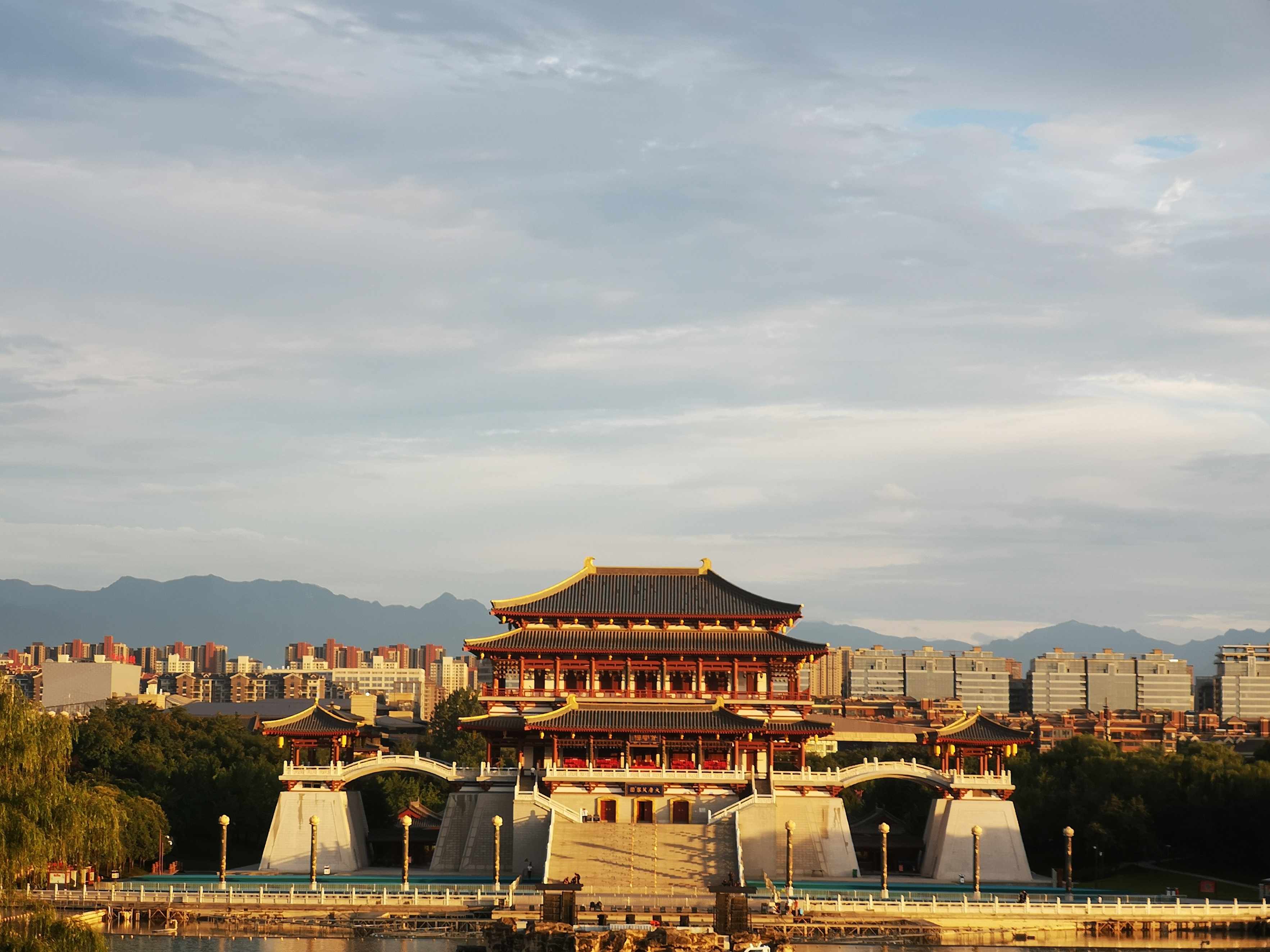 中文（中国大陆）: 大唐芙蓉园紫云楼